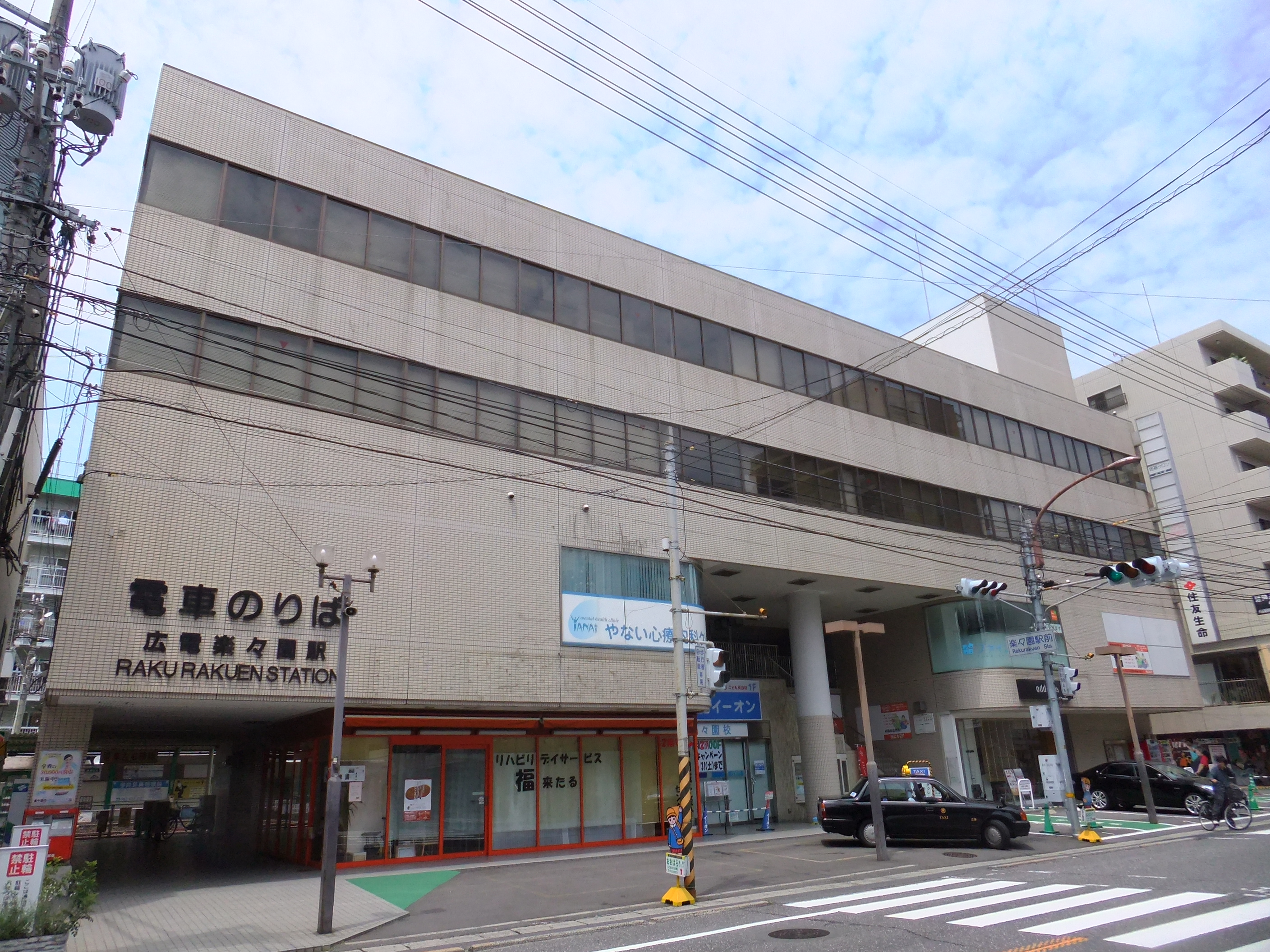 楽々園駅